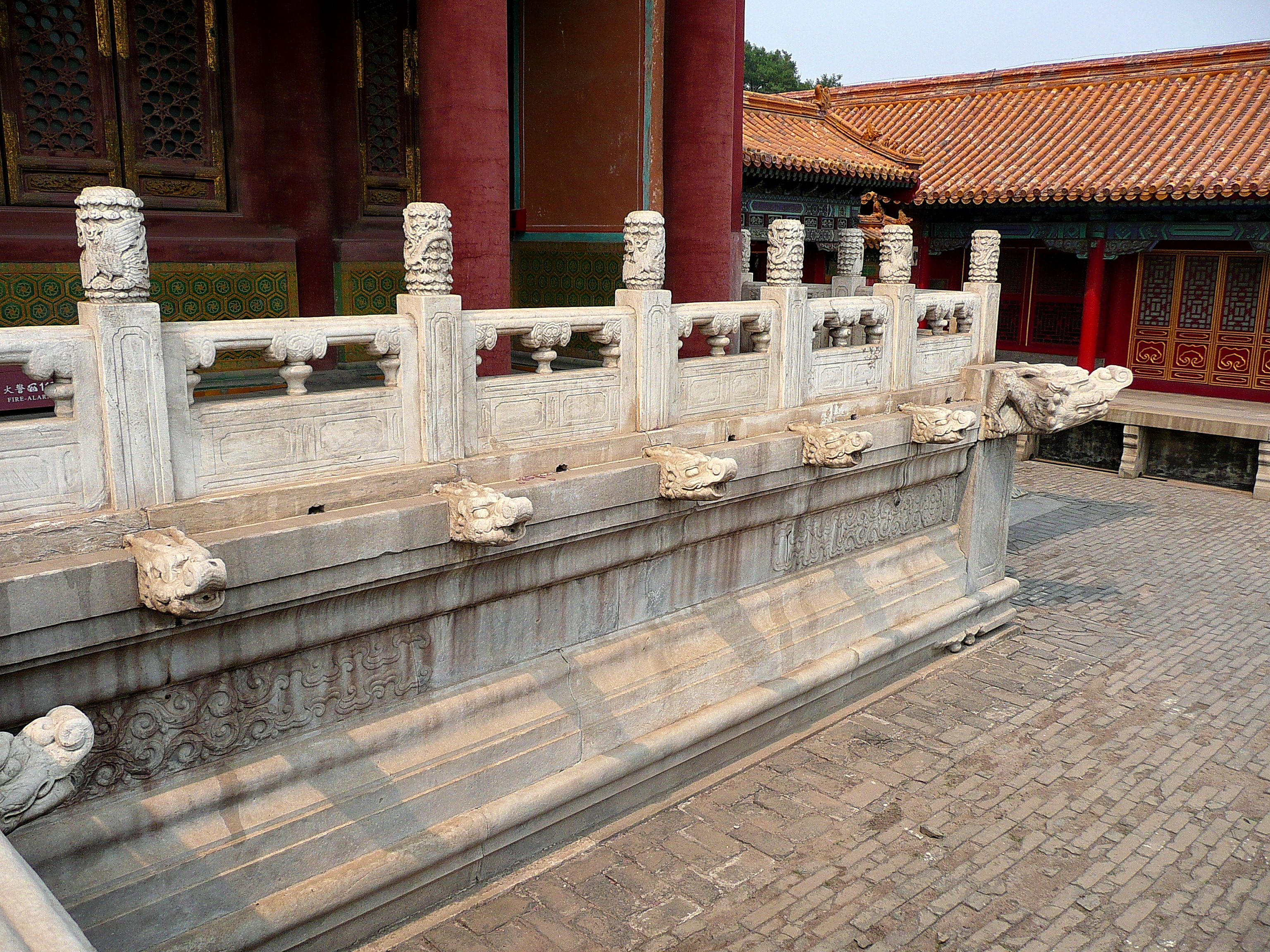 皇極殿 Huangji Hall